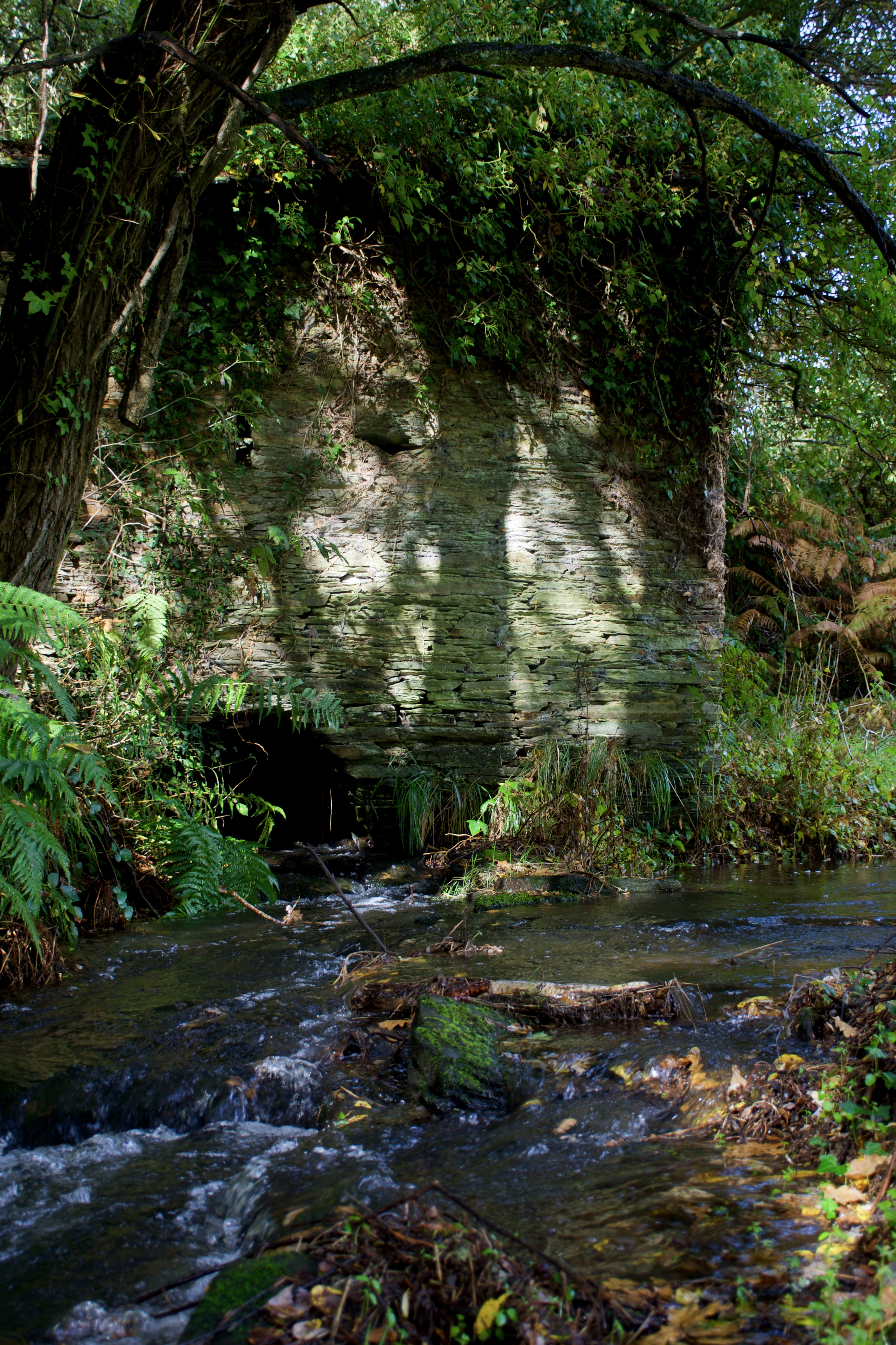 Este é un tramo do Regato do Cepelo, un pequeno arroio afluente do Río Pequeno, situado en Outeiro de Rei, un pobo que se atopa na provincia de Lugo, en Galiza. Este regato serviu de inspiración para moitos escritores, simbolizando a humildade na maioría de poemas, sobre todo nos de Manuel María, escritor lucense con gran relación co Cepelo.